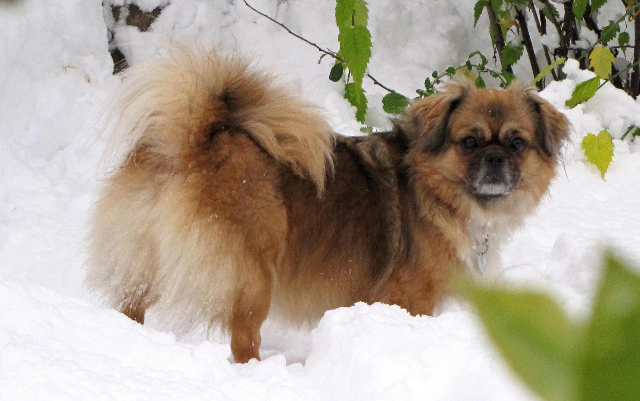 Photo d'un épagneul du tibet, 4ans.